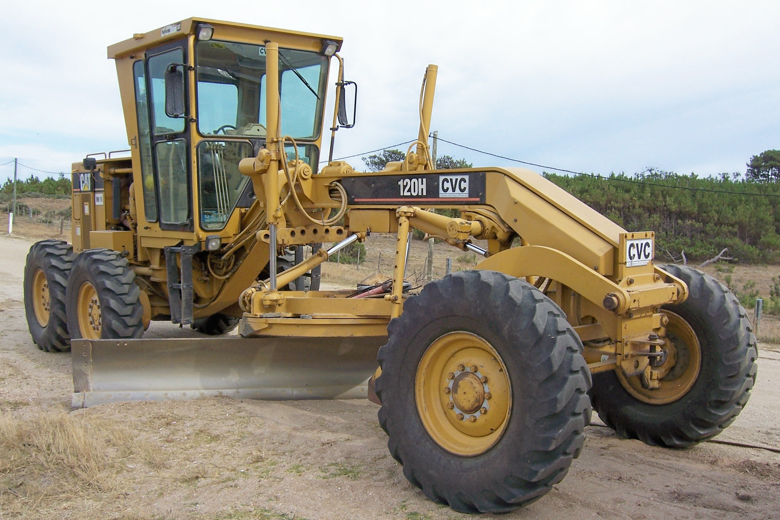 Motoniveladora marca Caterpillar (CAT) modelo 120H de la empresa Construcciones Viales y Civiles S.A (CVC) en Uruguay (América del Sur)